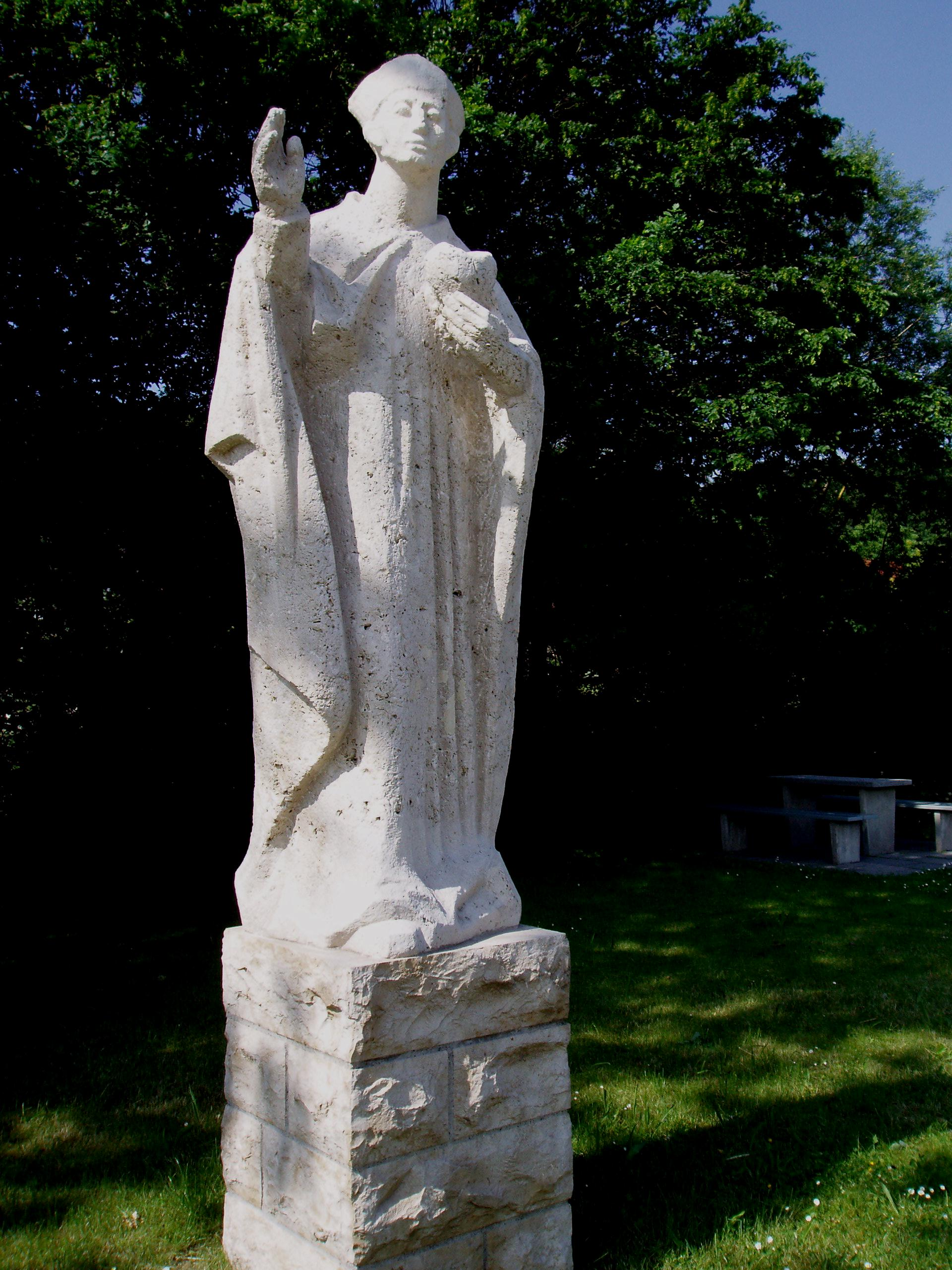 Steinplastik hl. Aloysius in Obereichstätt von Immer Hoefer-Purkhold